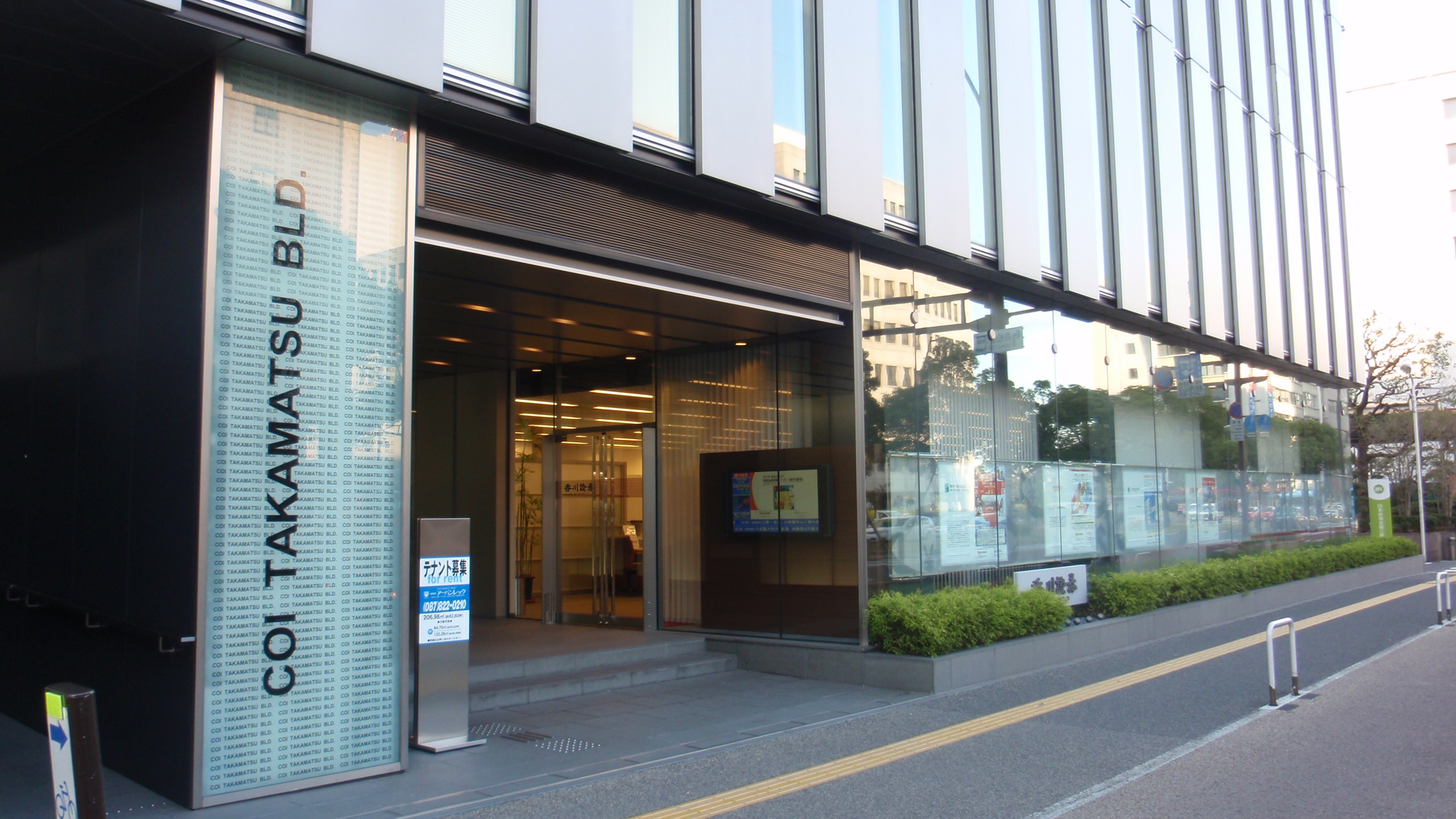 香川県高松市寿町二丁目にある香川証券本社の営業部門。